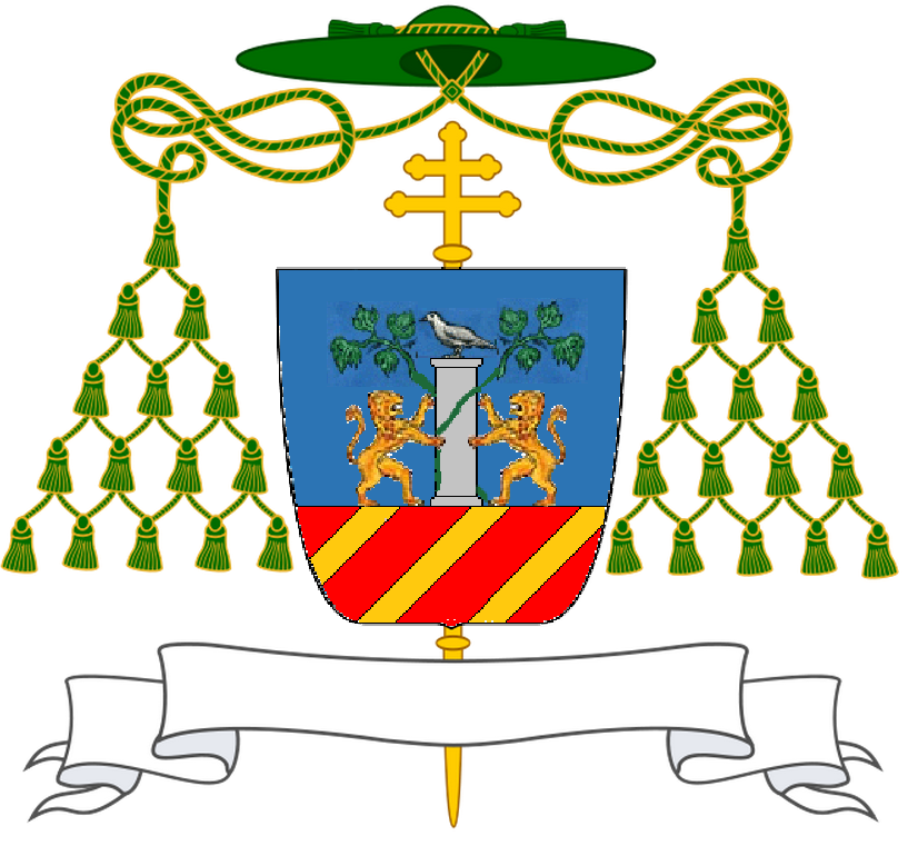 Stemma di Francesco Maria Milesi, patriarca di Venezia